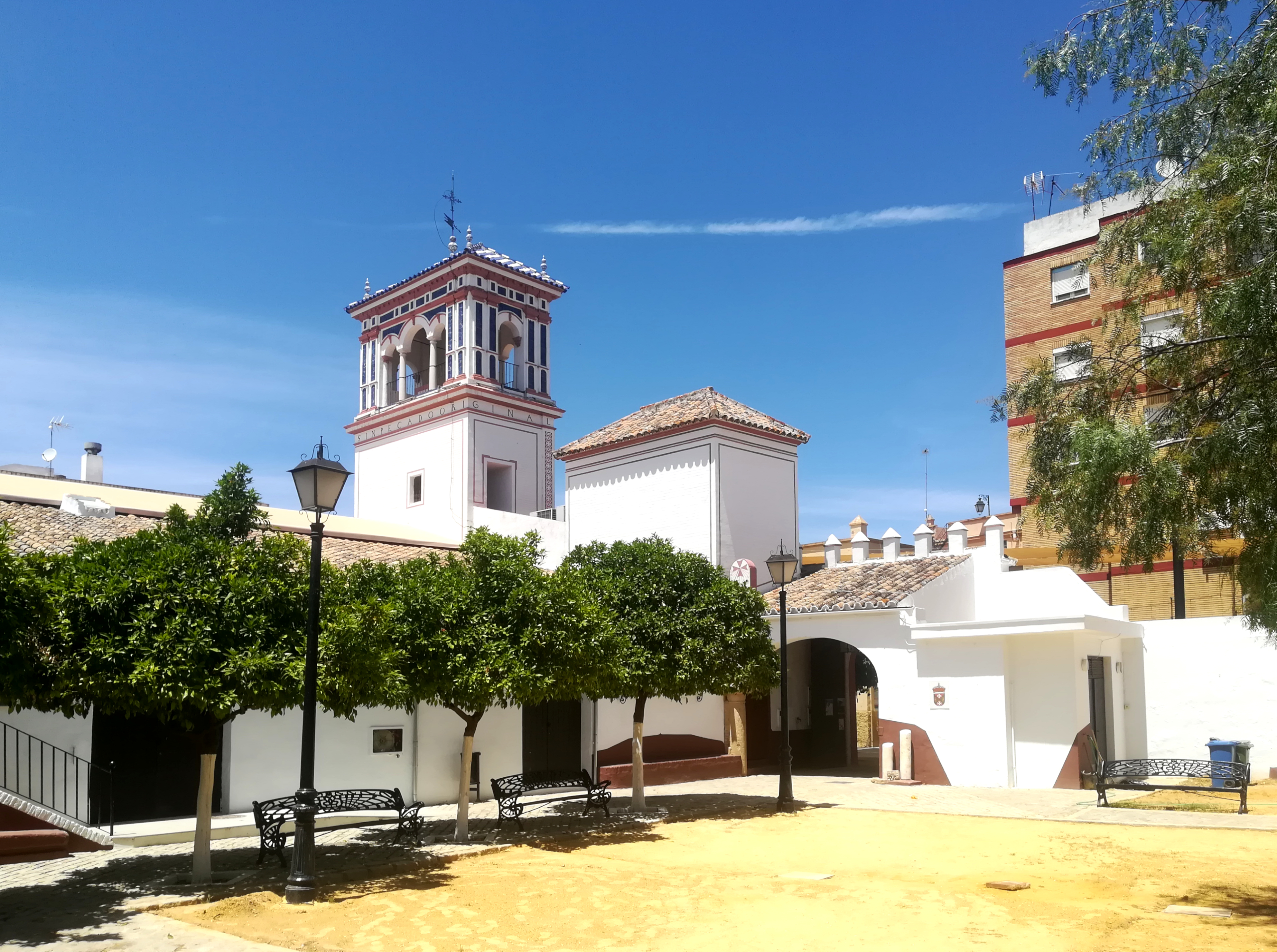 Hacienda Montefuerte. Tomares, provincia de Sevilla, Andalucía, España.